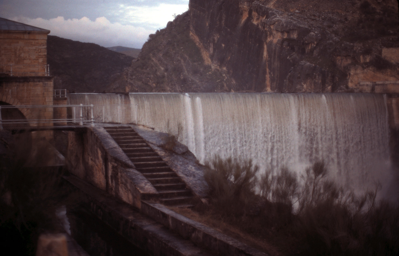 El Pontón de la Oliva vertiendo. A la izquierda el inicio del canal primitivo de Isabel II.